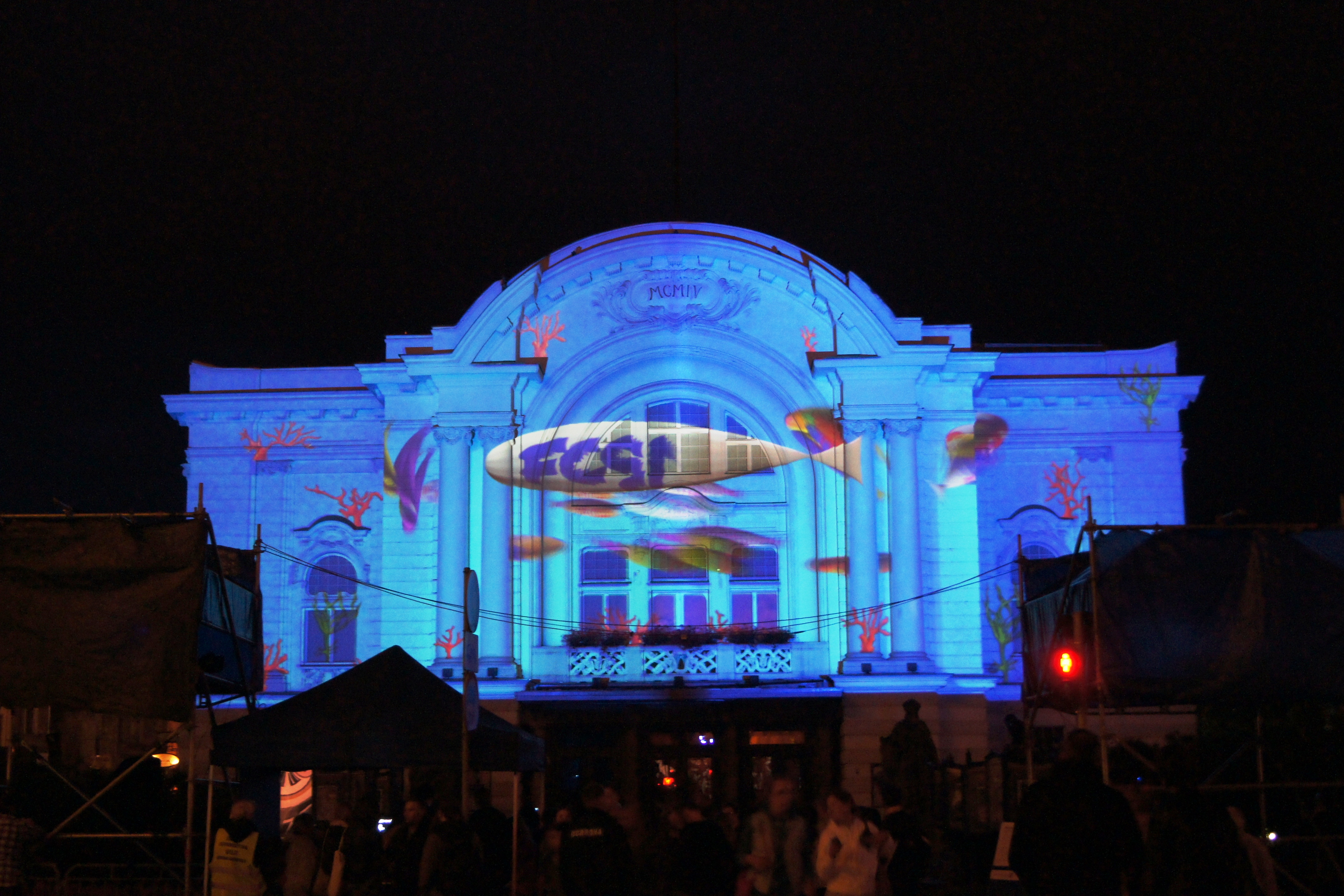 Toruń, pl. Teatralny 1 - dawny Teatr Miejski, obecnie im. Wiliama Horzycy, 1903-1904 (zabytek nr rejestr. A/277)